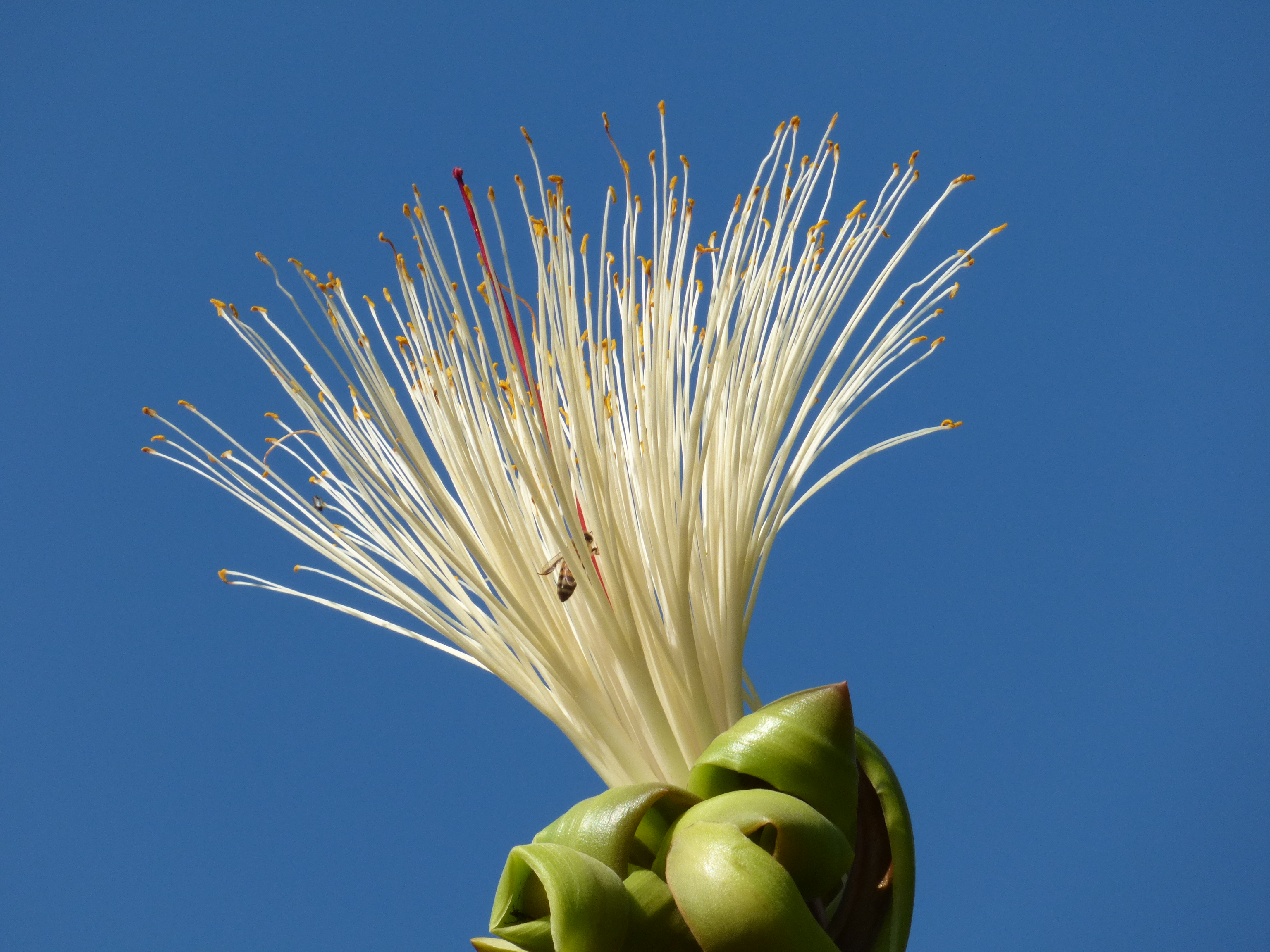 Castaño (Pachira glabra)